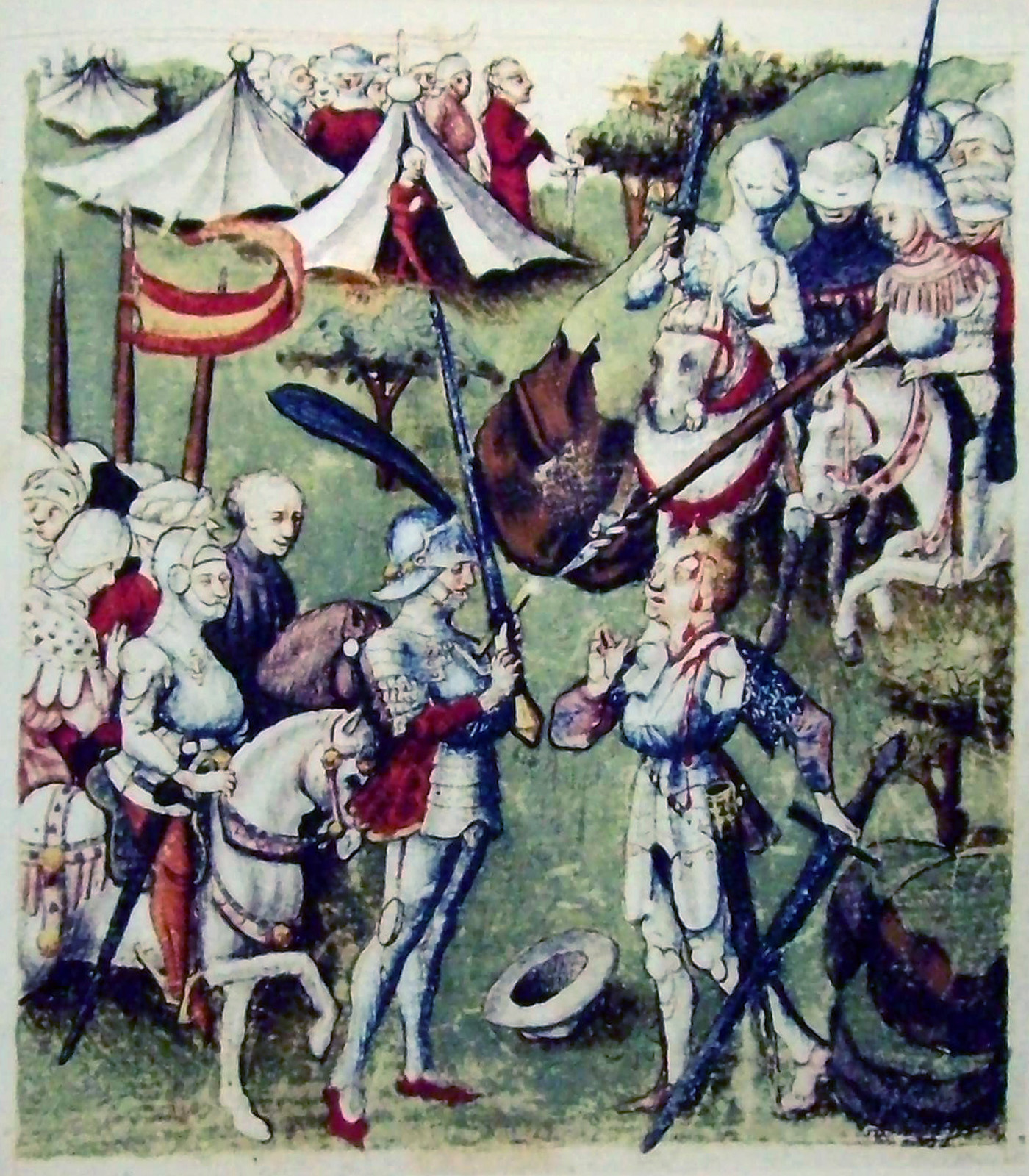 Reihenkampfmotiv mit Siegfried. Hundeshagener Codex, Ms. germ. fol. 855, Blatt 10r.